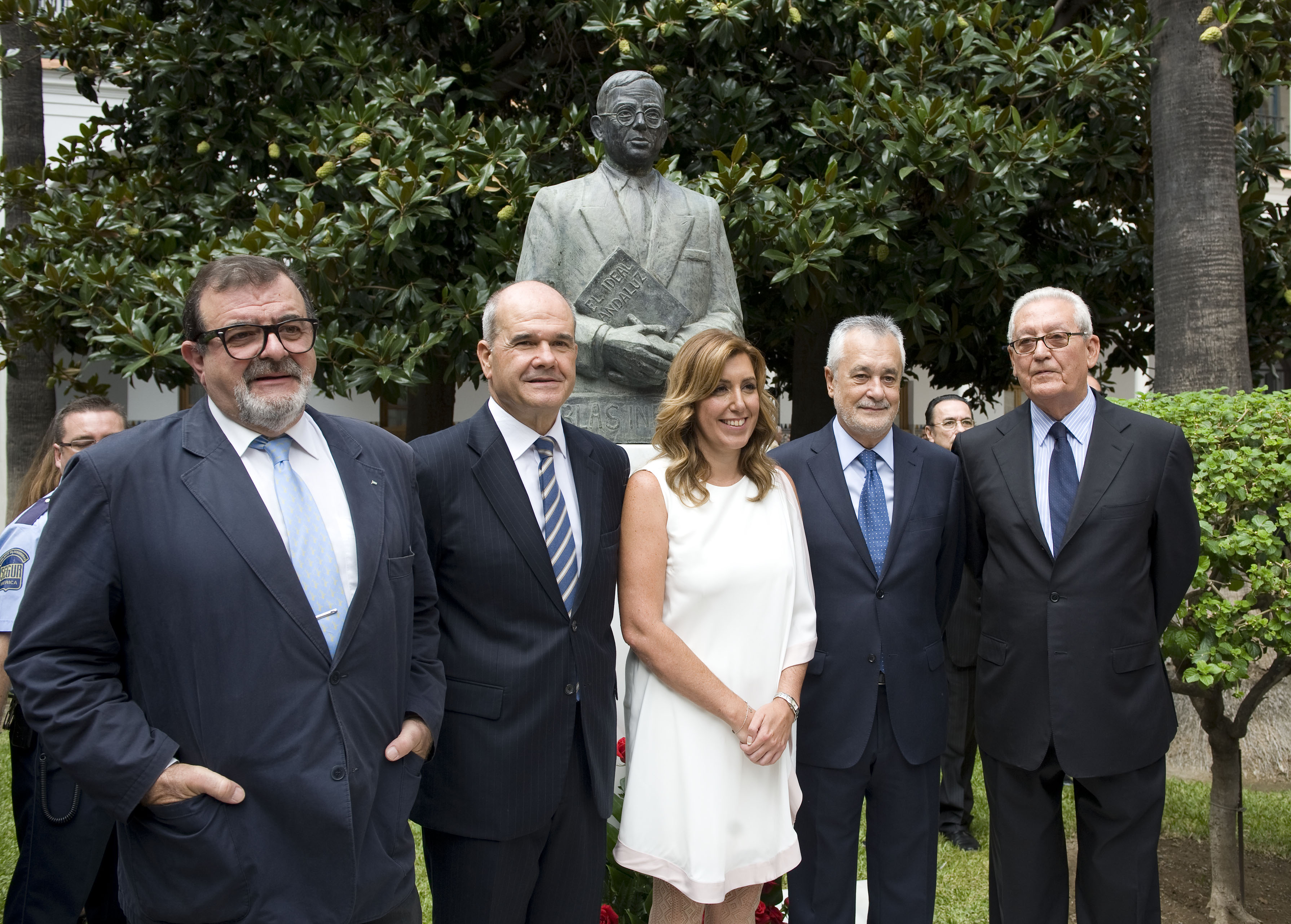 Varios presidentes de la Junta de Andalucía